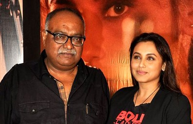 Pertemuan media dari Mardaani, 2014